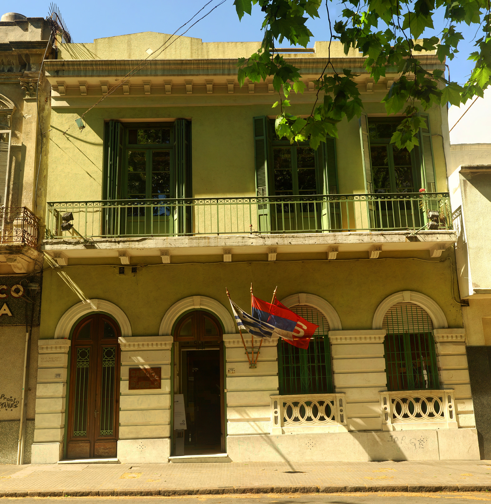 Fachada de Casa del Pueblo, sede principal e histórica del Partido Socialista del Uruguay